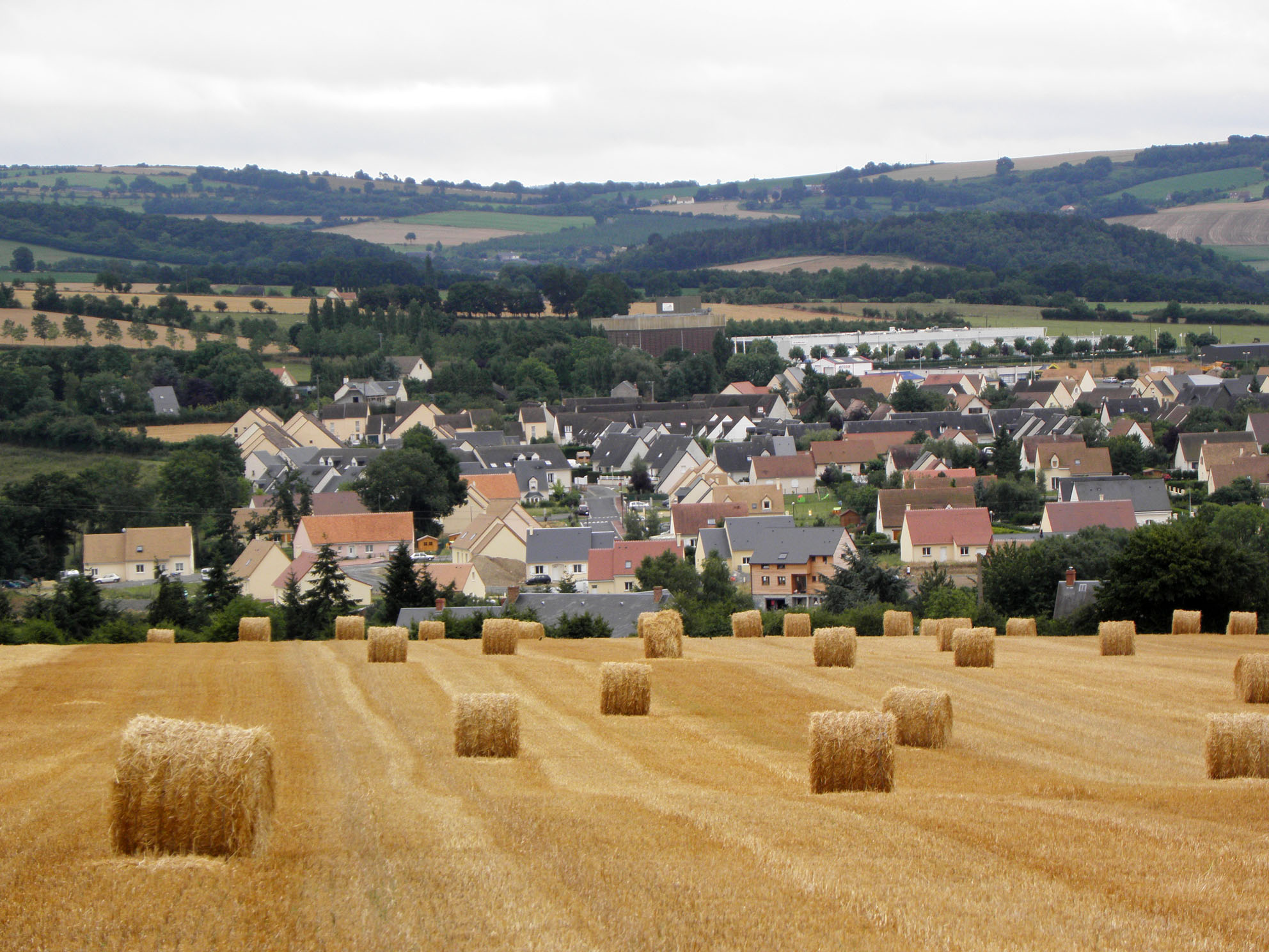 Vue sur Thury-Harcourt (Suisse Normande)